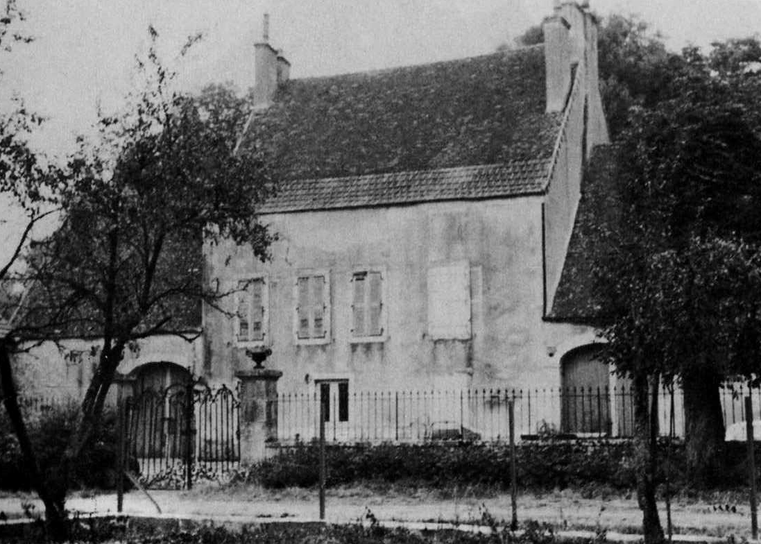 Xavier Forneret - propriété de Mimande en 1880